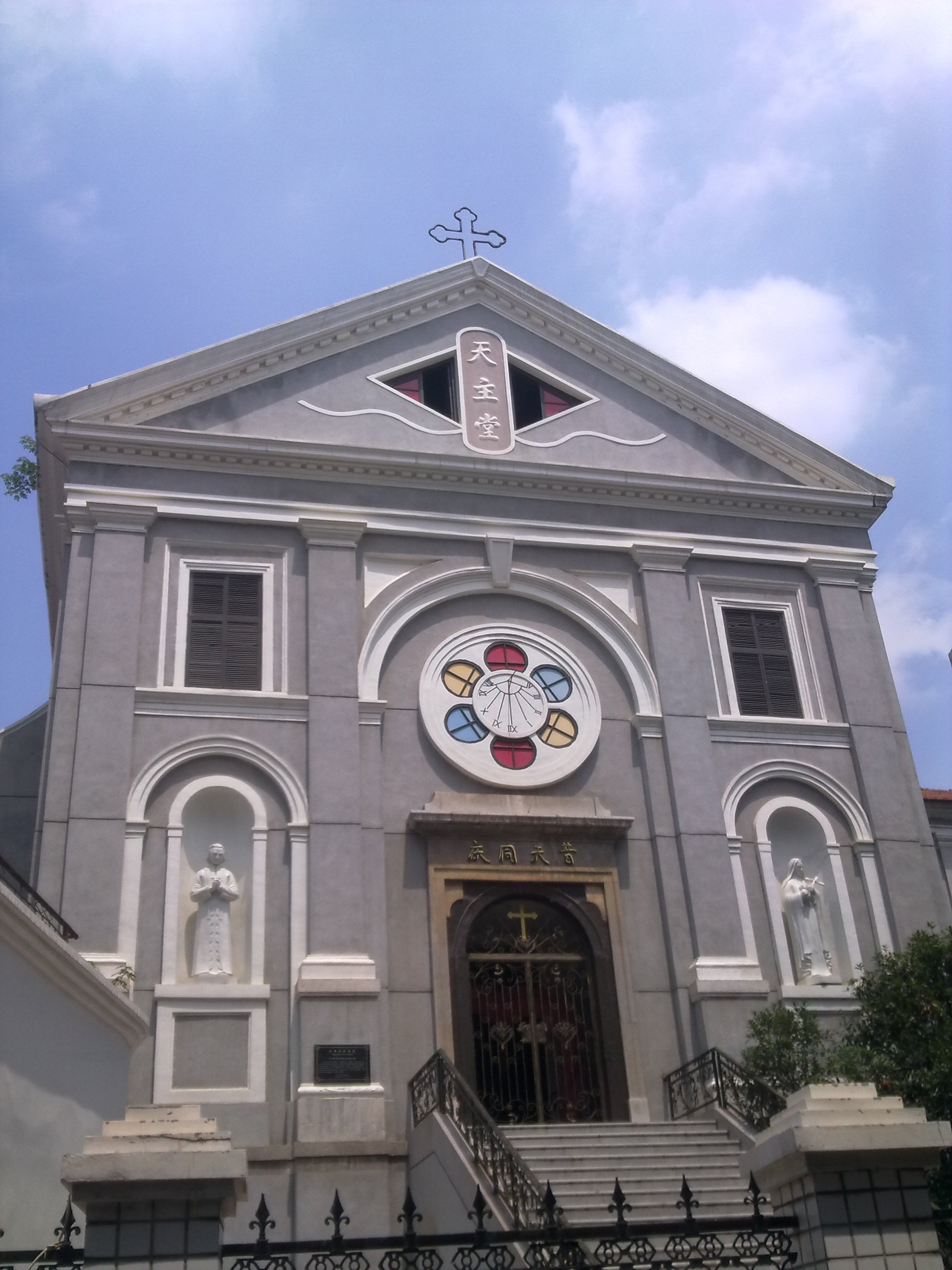 昙花林花园山圣家堂